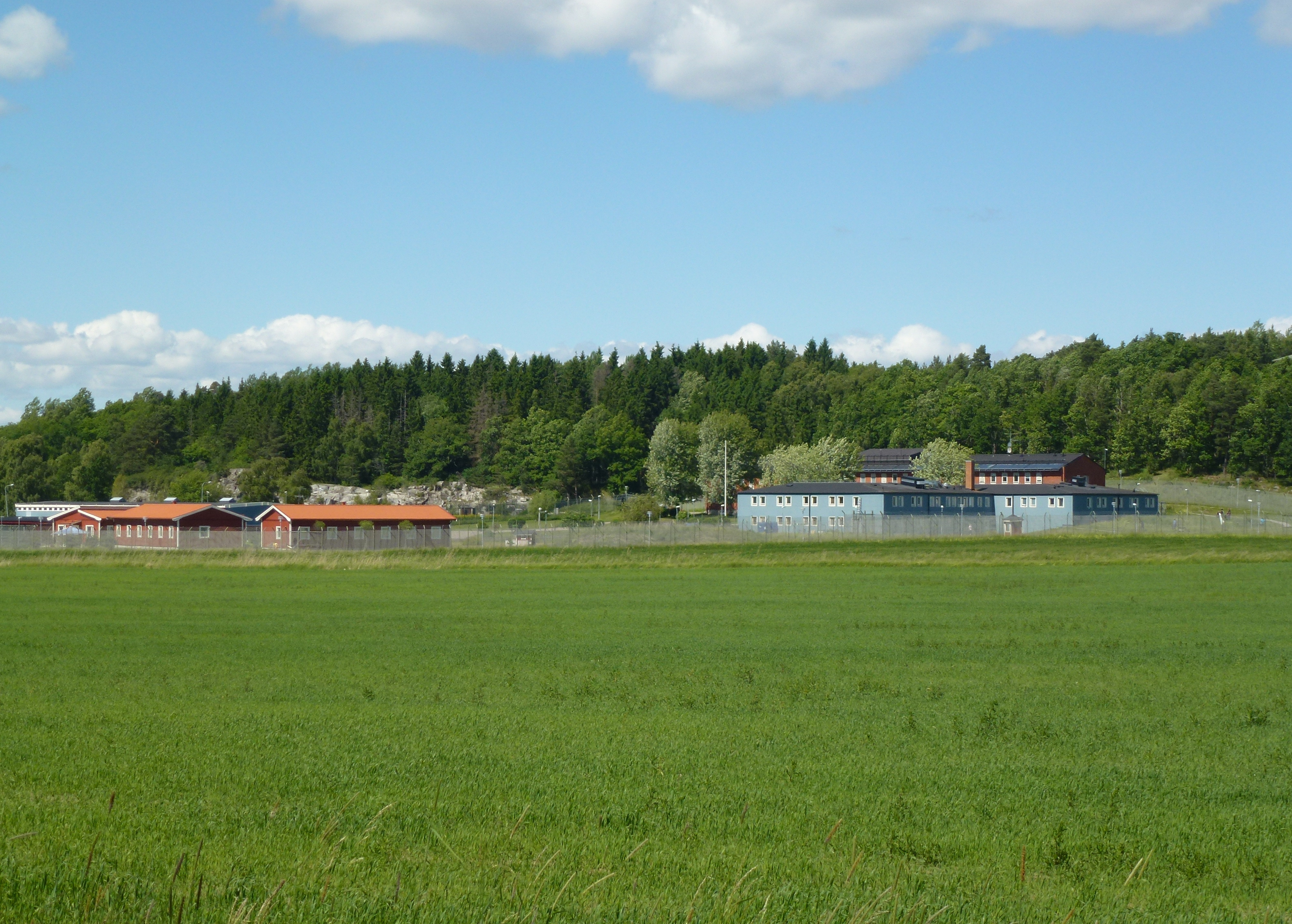 Svartsjöanstalten